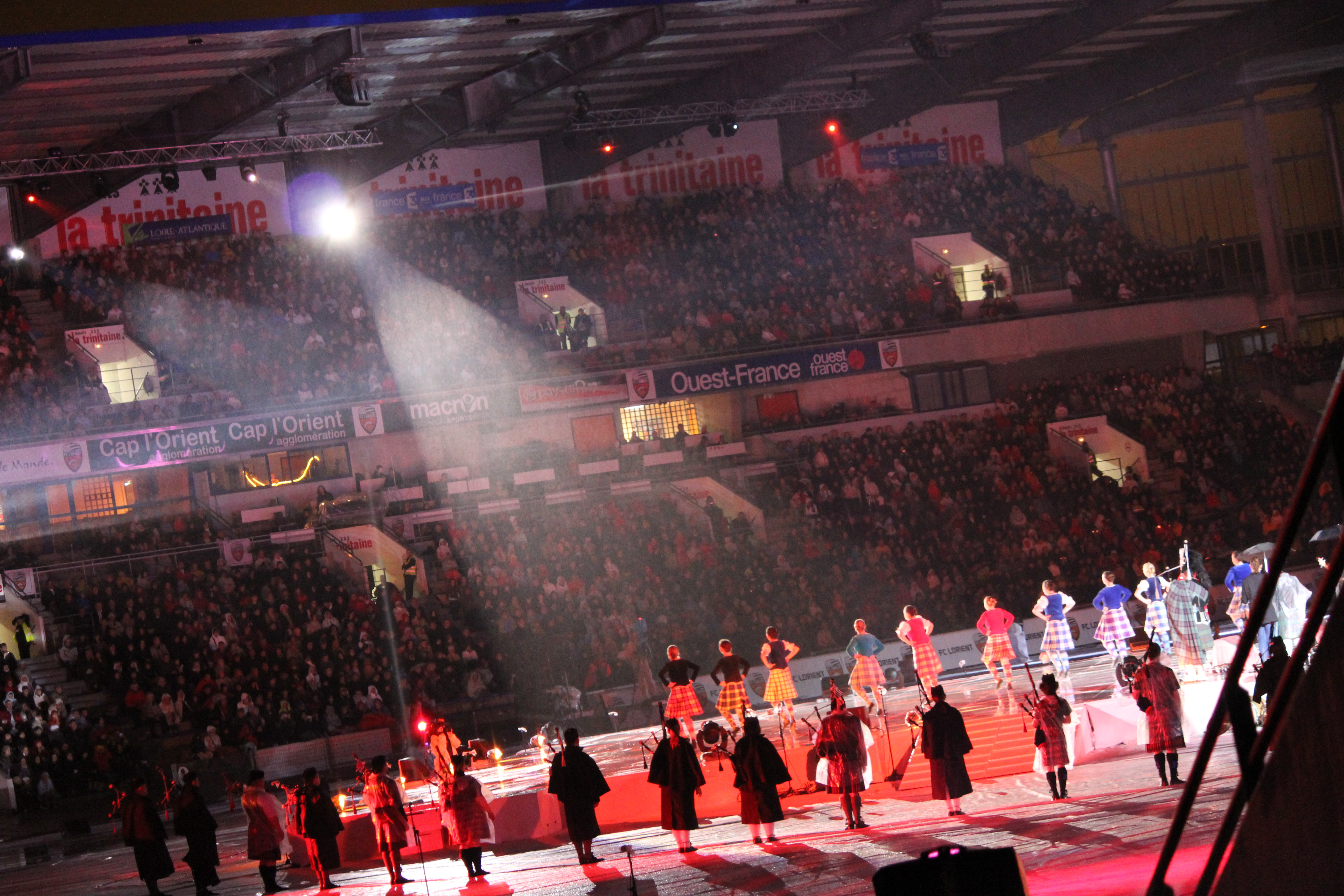 groupe de dances écossaises et pipe bands lors d'une nuit magique au festival interceltique de Lorient 2011